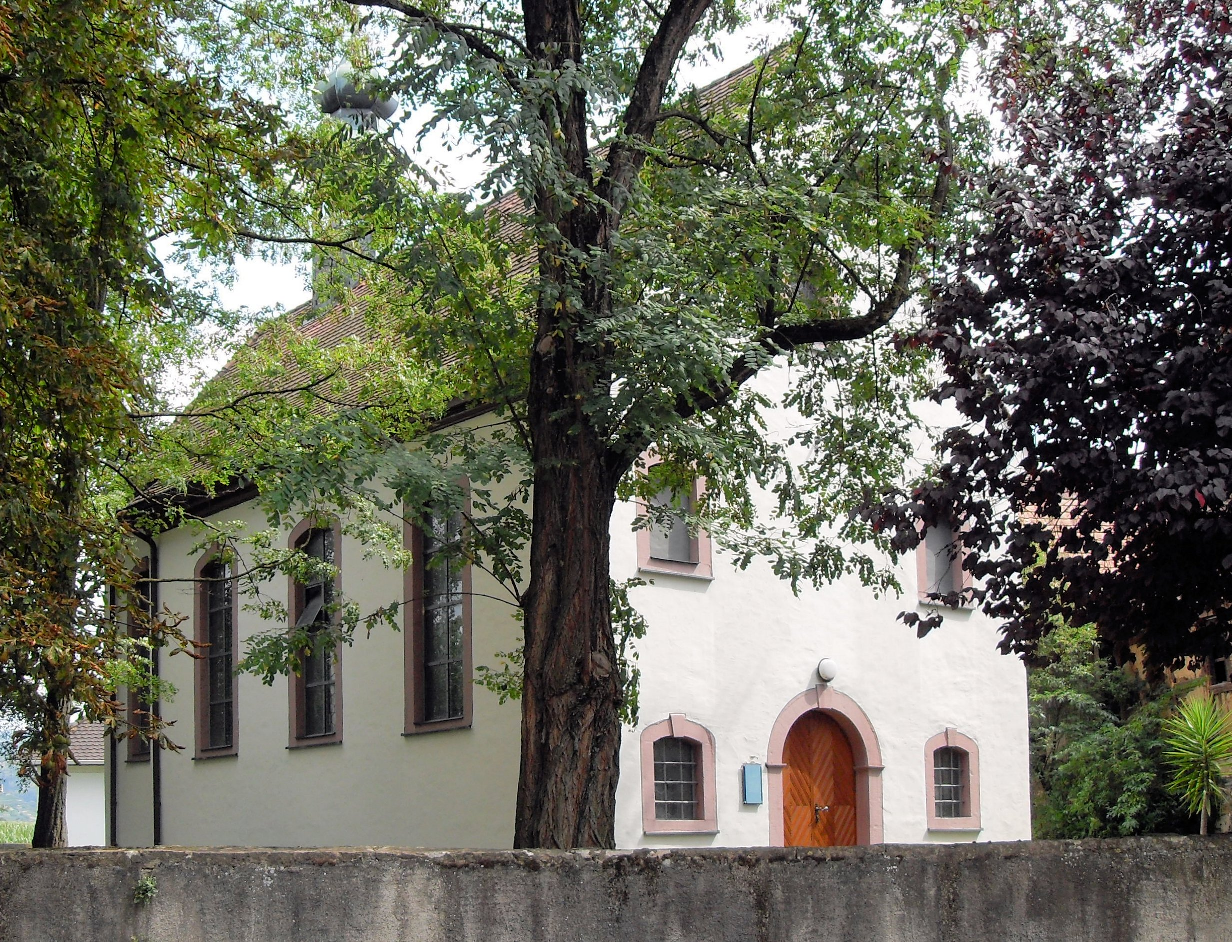 St.-Felix- und Nabor-Kapelle in Schmidhofen, Stadt Bad Krozingen, Baden-Württemberg